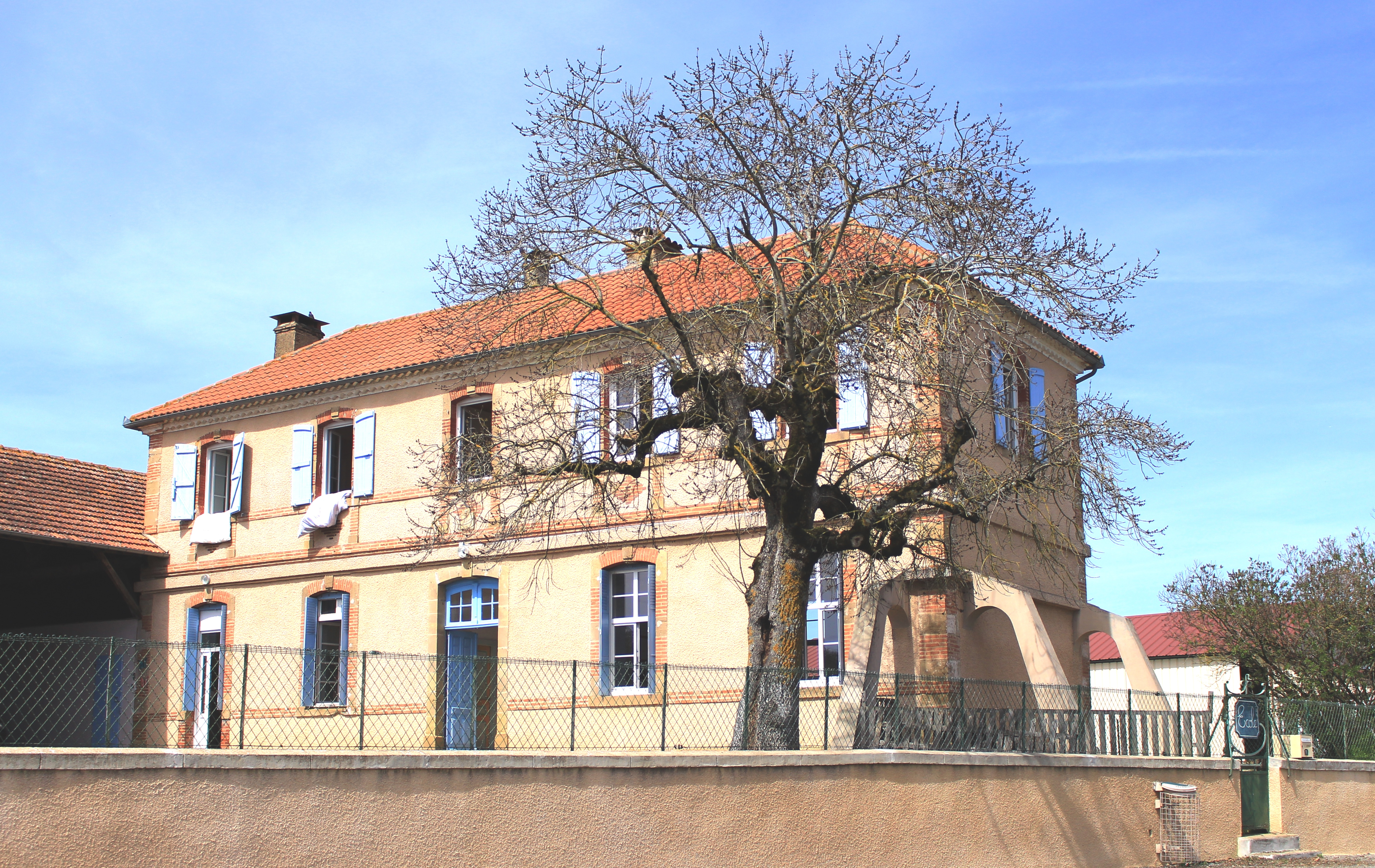 École de Sadournin (Hautes-Pyrénées)